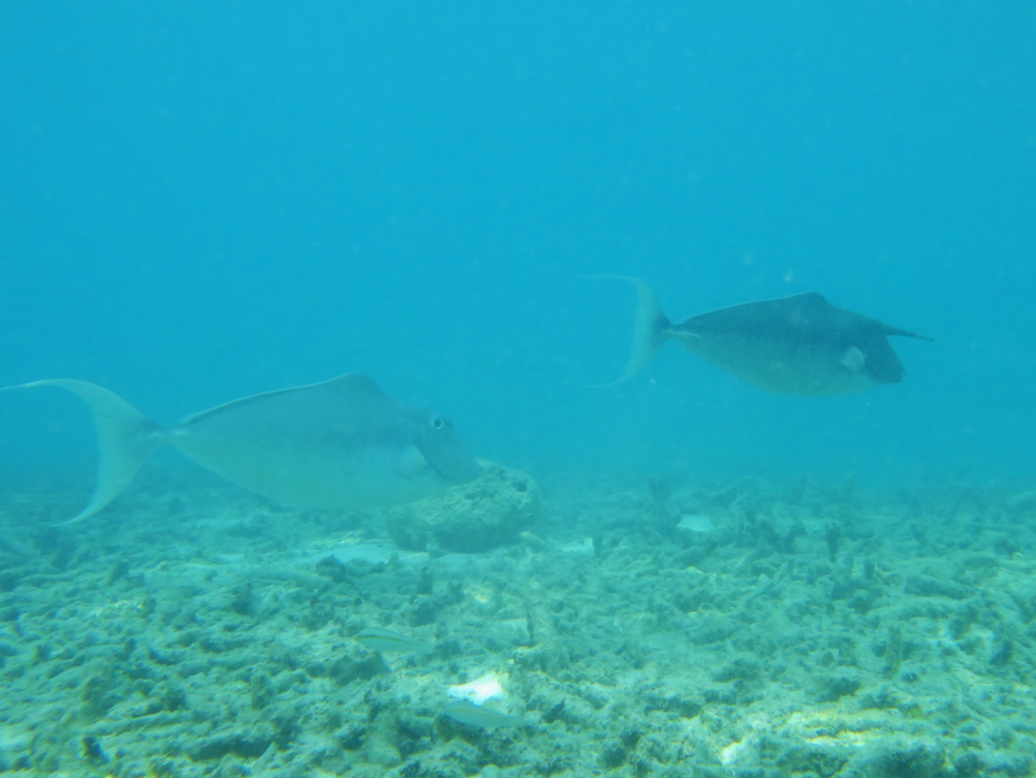 Un couple de nasons bossus (Naso brachycentron) sur le platier nord-est de Landaagiraavaru (Maldives, atoll de Baa).